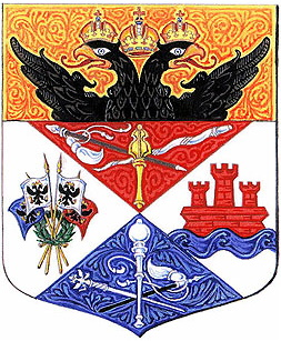 Герб Новочеркасска с 1998 года